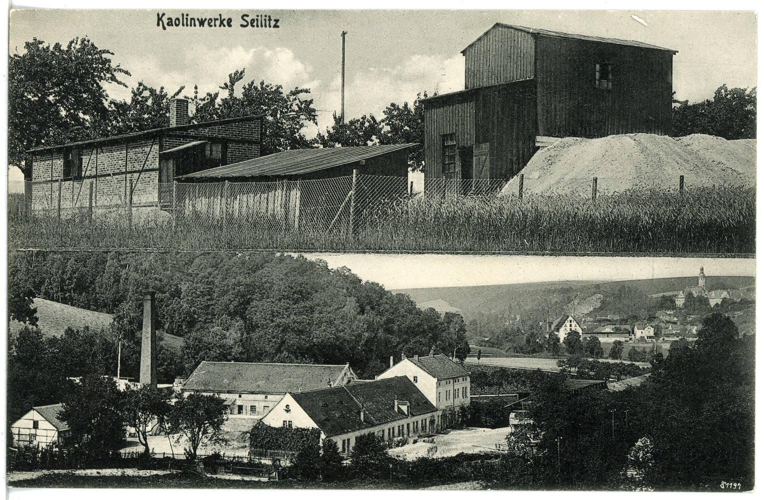 Seilitz; Kaolinwerke This postcard is from publisher Brück & Sohn in Meißen ( postcard has a unique number 20303 and is available in a higher resolution at the publisher. This images was uploaded in a cooperation project between Wikipedians and the publisher.